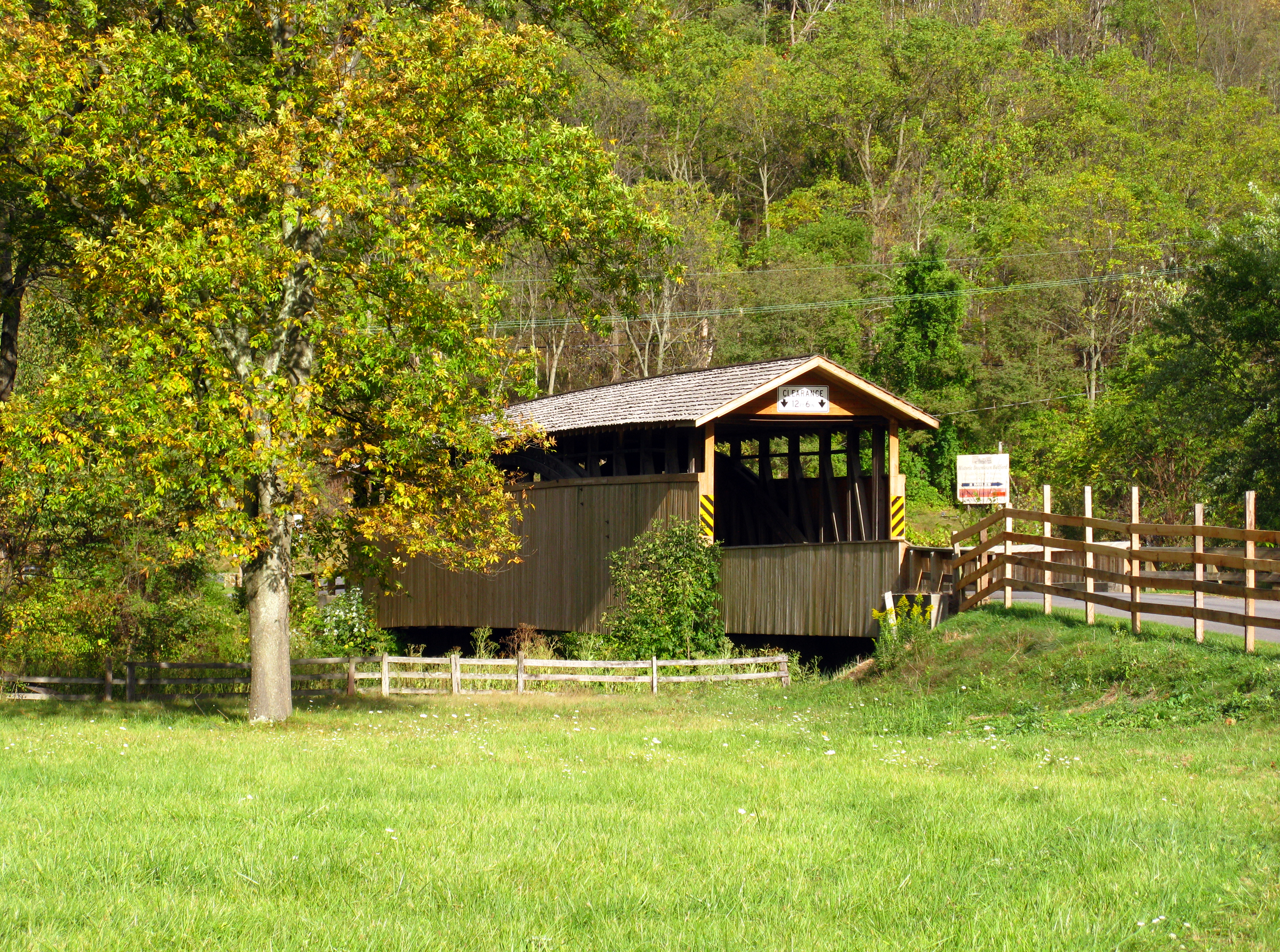 Old Bedford Village Covered Bridge